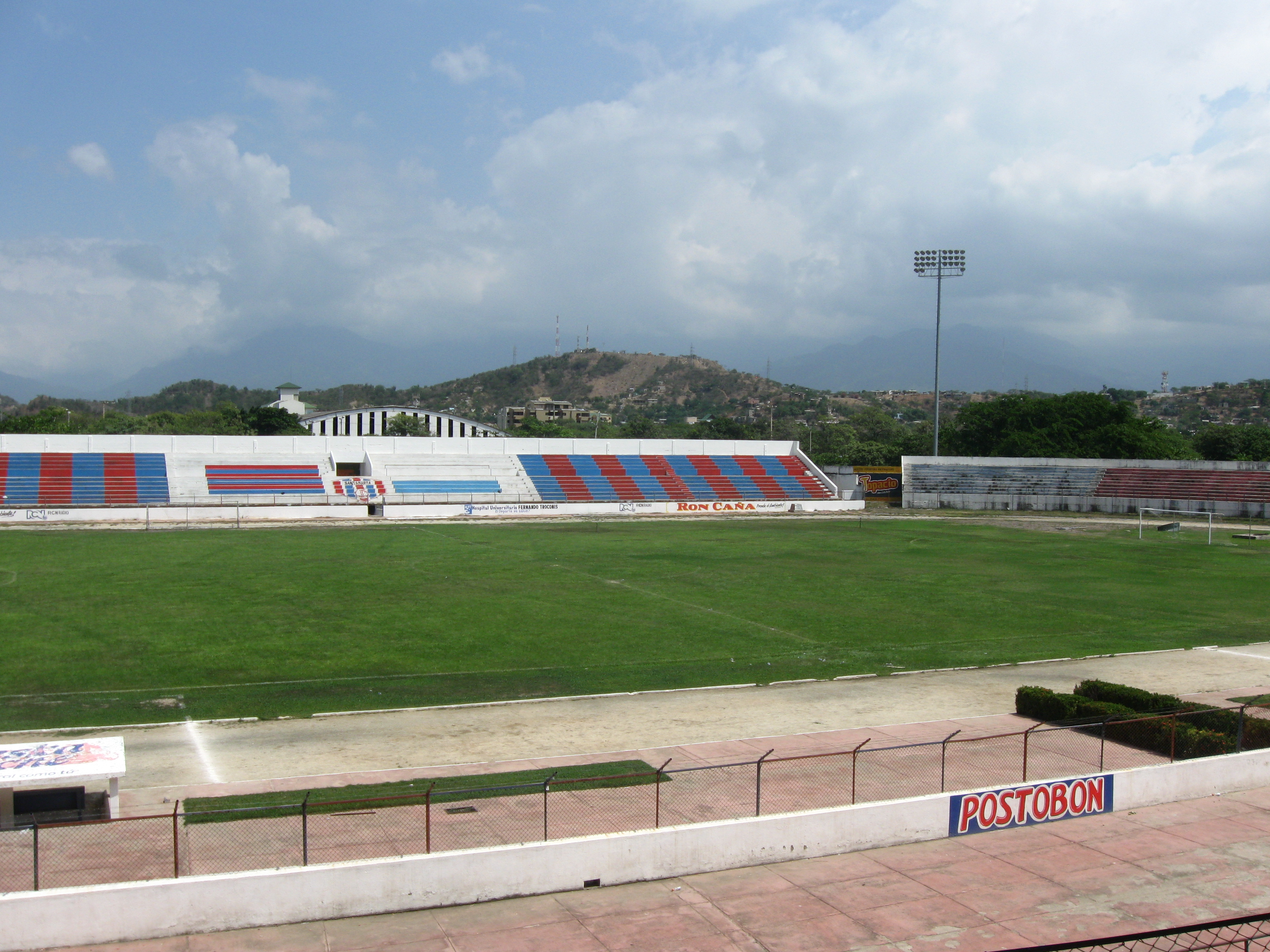 Vista Interior del estadio del Unión Magdalena